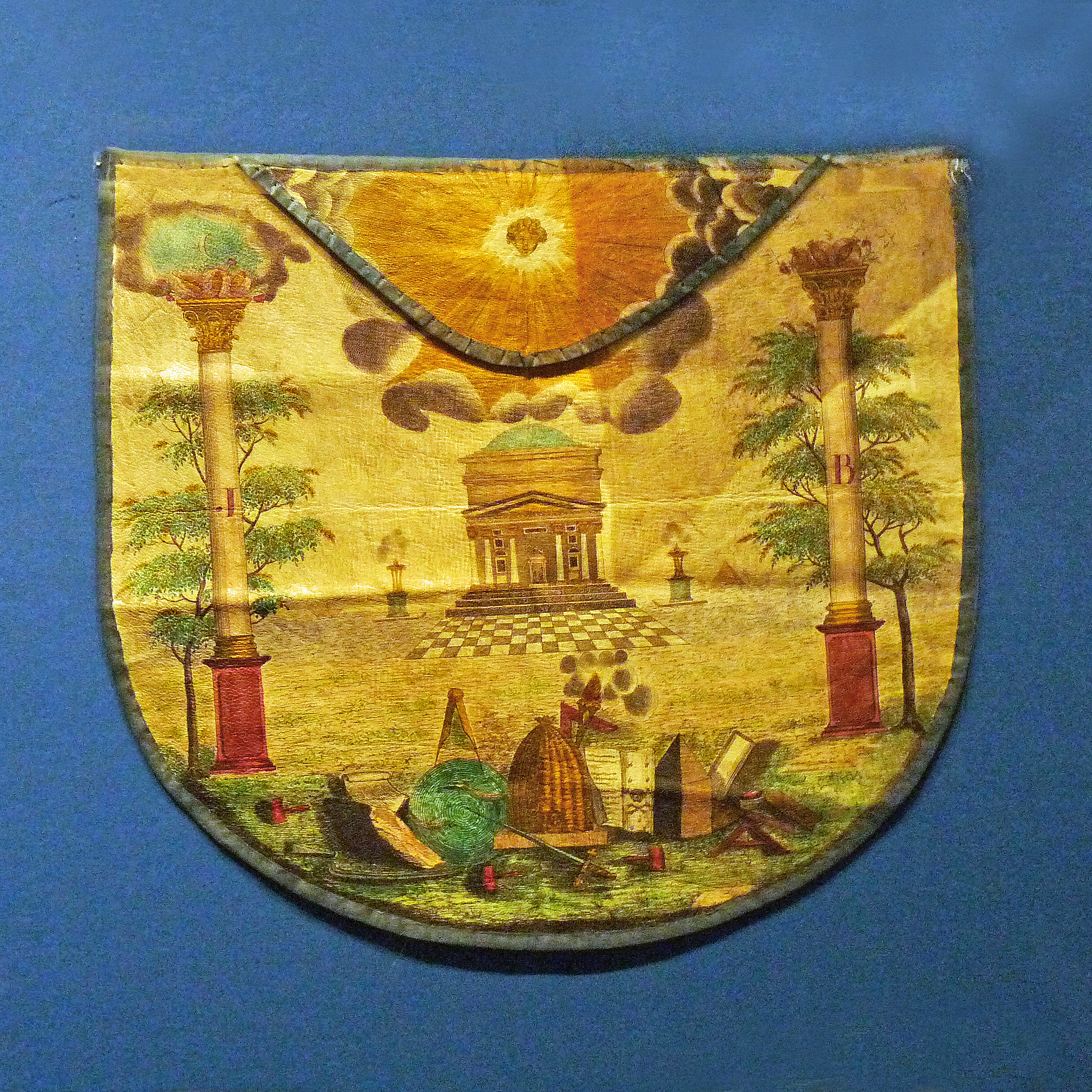 Franc-maçonnerie à Strasbourg : tablier de maître brodé (19e s.)